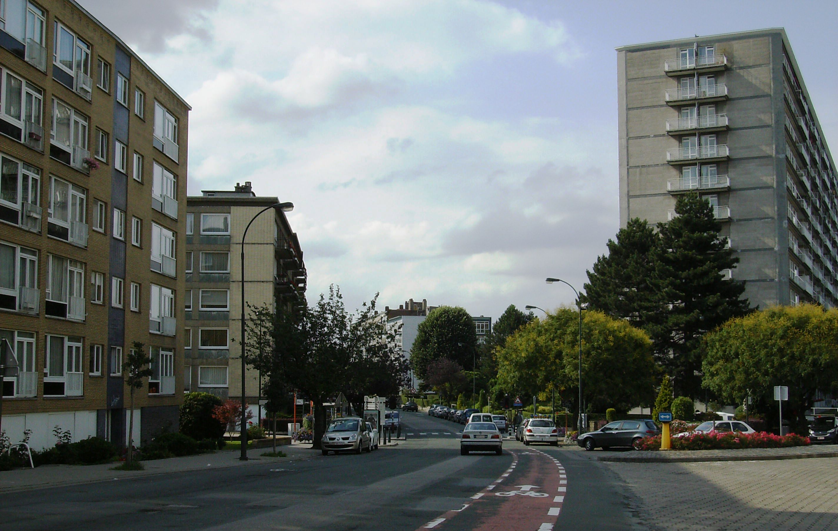 avenue G-E. Lebon Auderghem Belgium